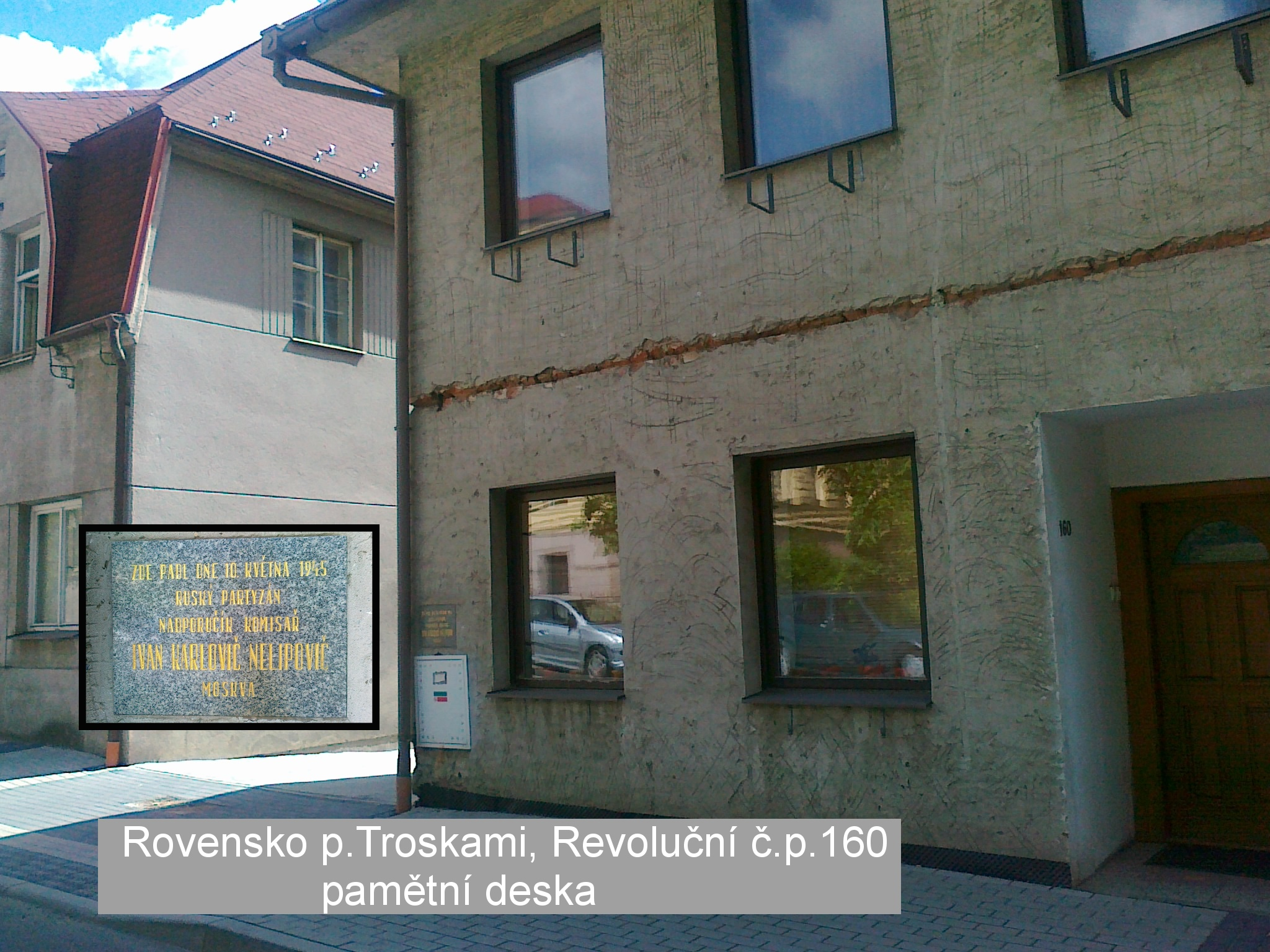 dům v Rovensku pod Troskami u kterého byl zastřelen